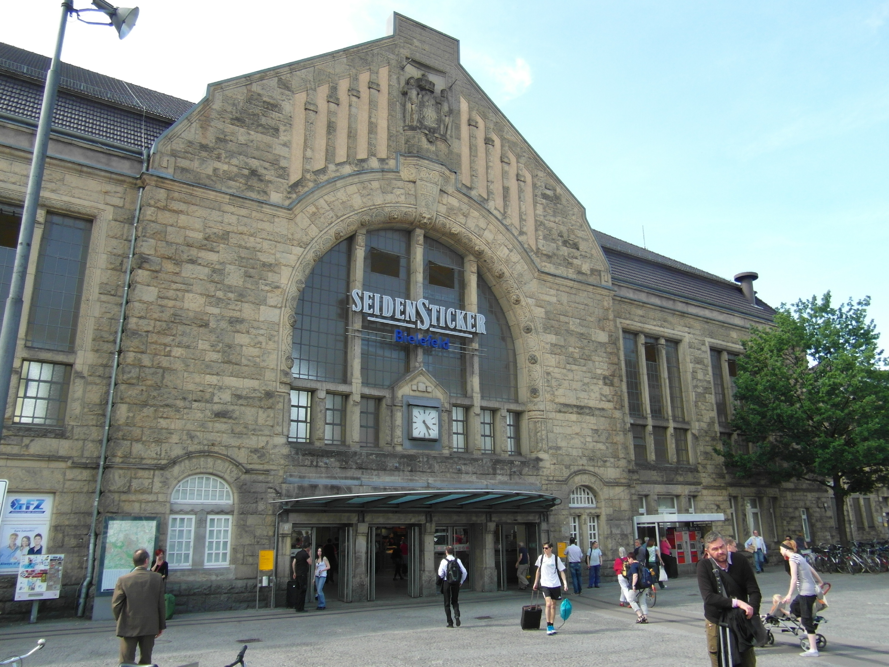 Bielefeld - Hauptbahnhof